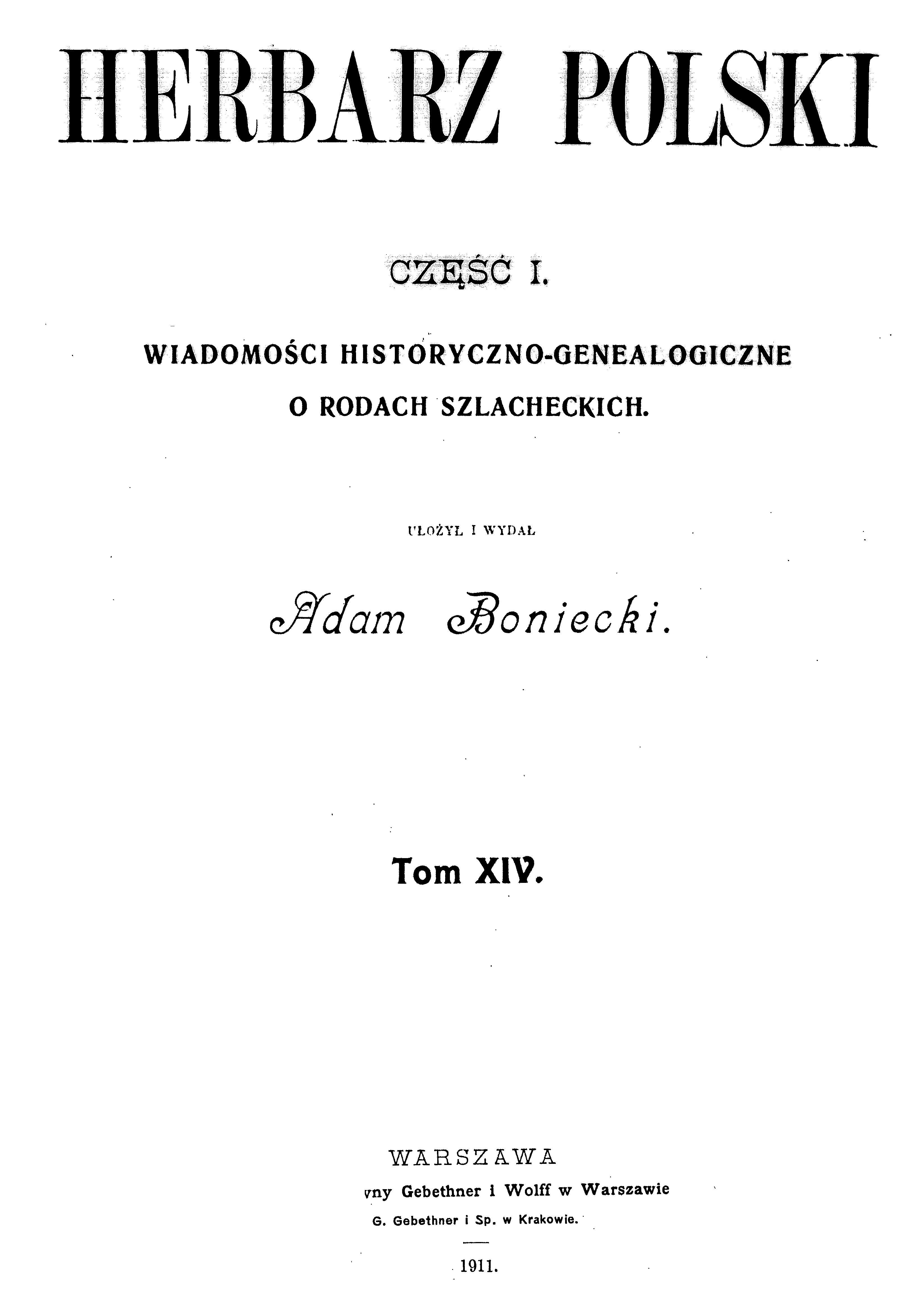 Титульная страница Гербовника Адама Бонецкого, том XIV